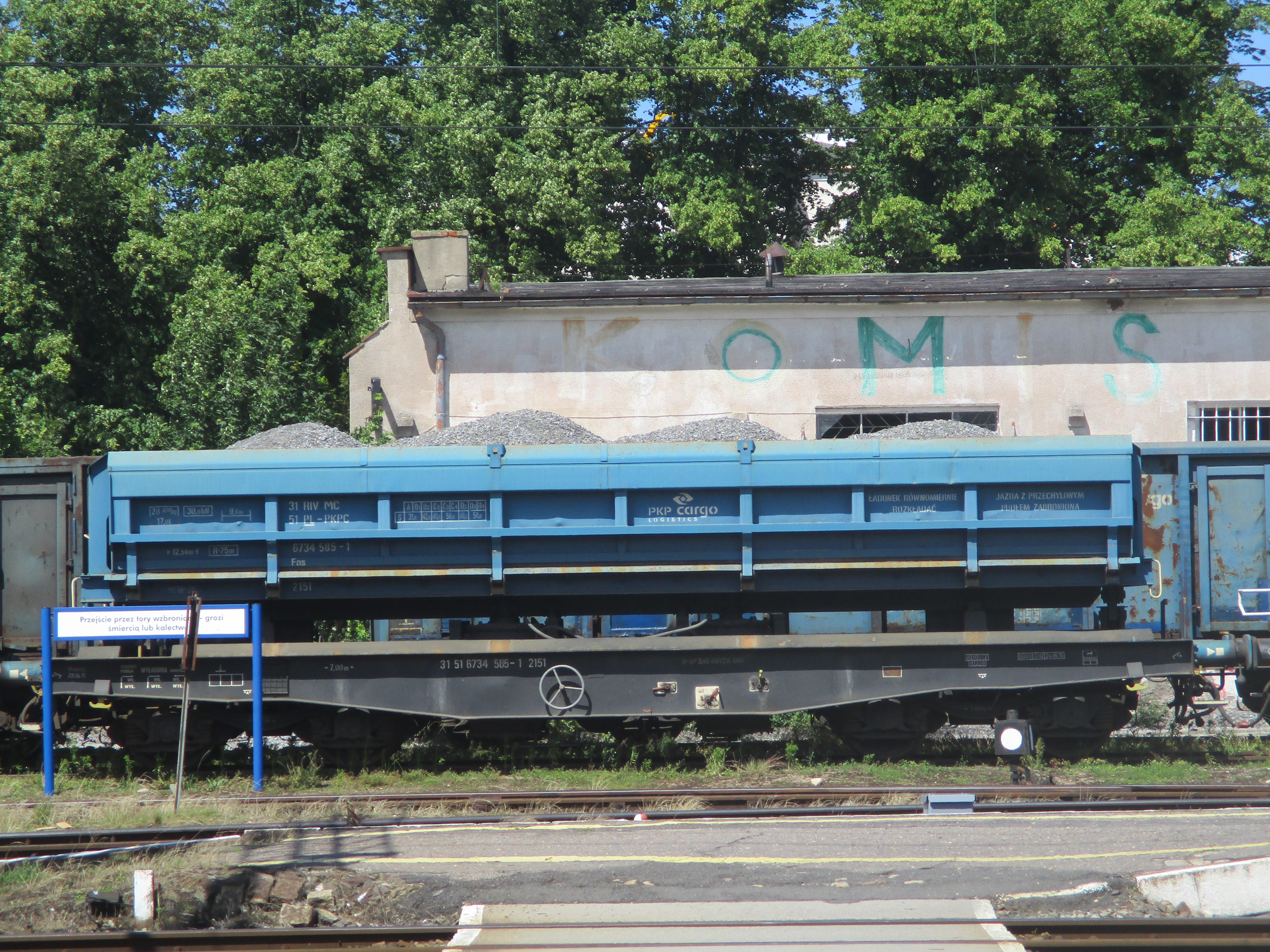 Polska węglarka budowy specjalnej typu Fas